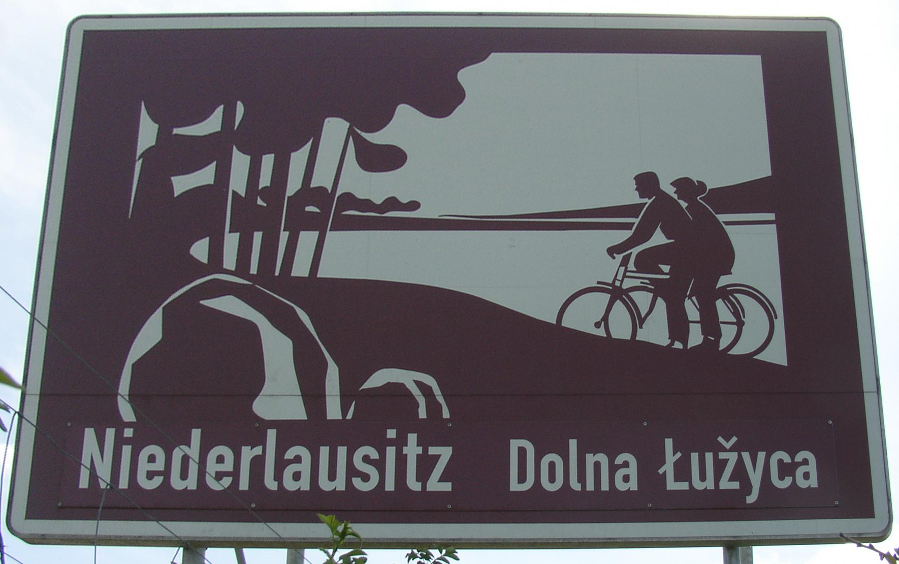 Unterrichtungstafel „Niederlausitz Dolna Łužyca“ an der A 13 (bei km 71,5 in Südrichtung), Deutschland